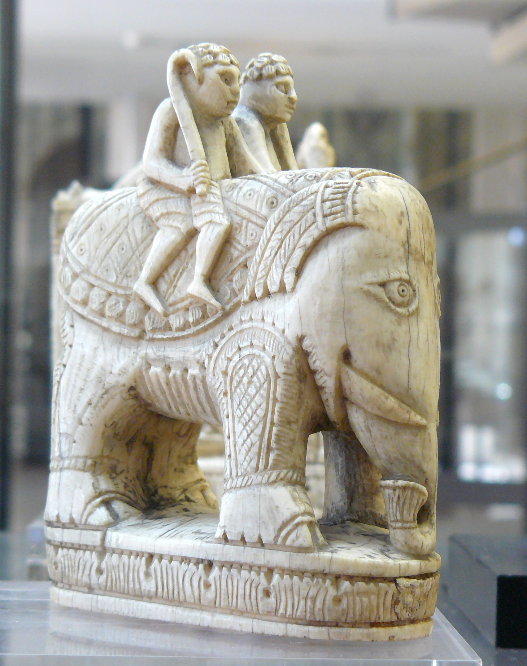 Échiquier dit de Charlemagne, éléphant (fou), ivoire d'éléphant, XIe siècle, Italie méridionale, trace de peinture, d'un ensemble de 16 pièces conservées dans le trésor de Saint-Denis - Hauteur environ 8 cm - Cabinet des médailles, Paris, n° Inv 305 à 323